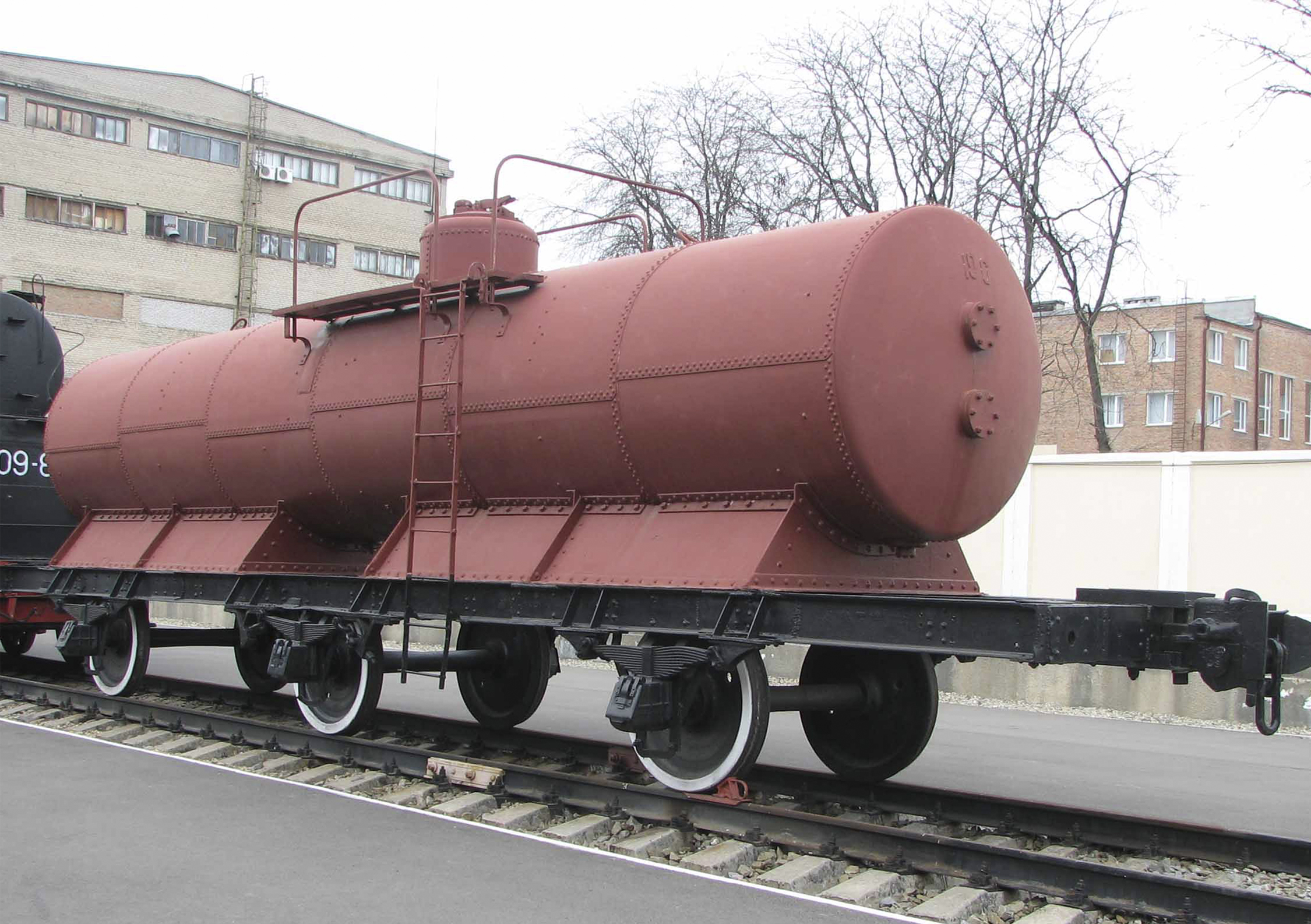 Цистерна построена в 1901 году заводом «РИНГГОФЕР», Австро-Венгрия. Трофей Первой мировой войны